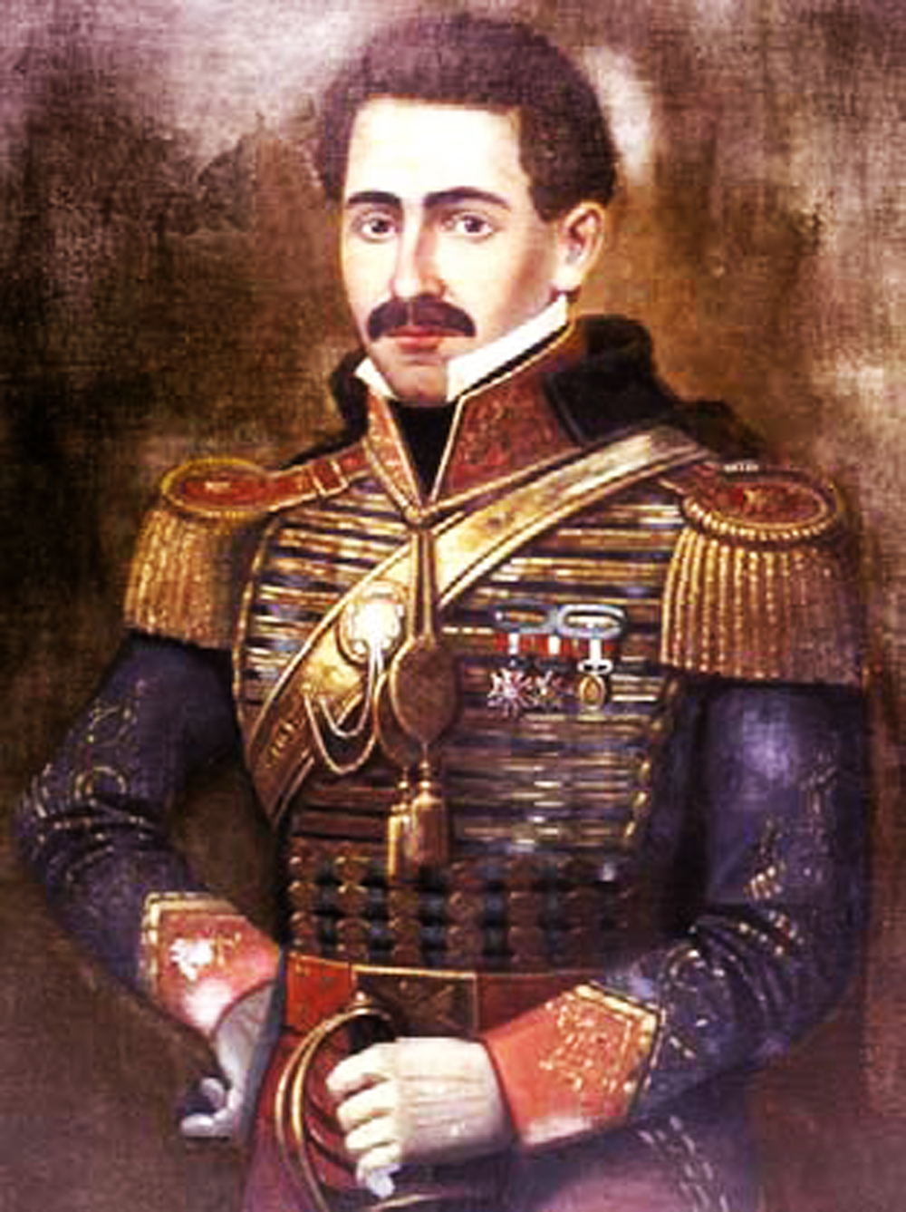 Domingo nieto vestido militar